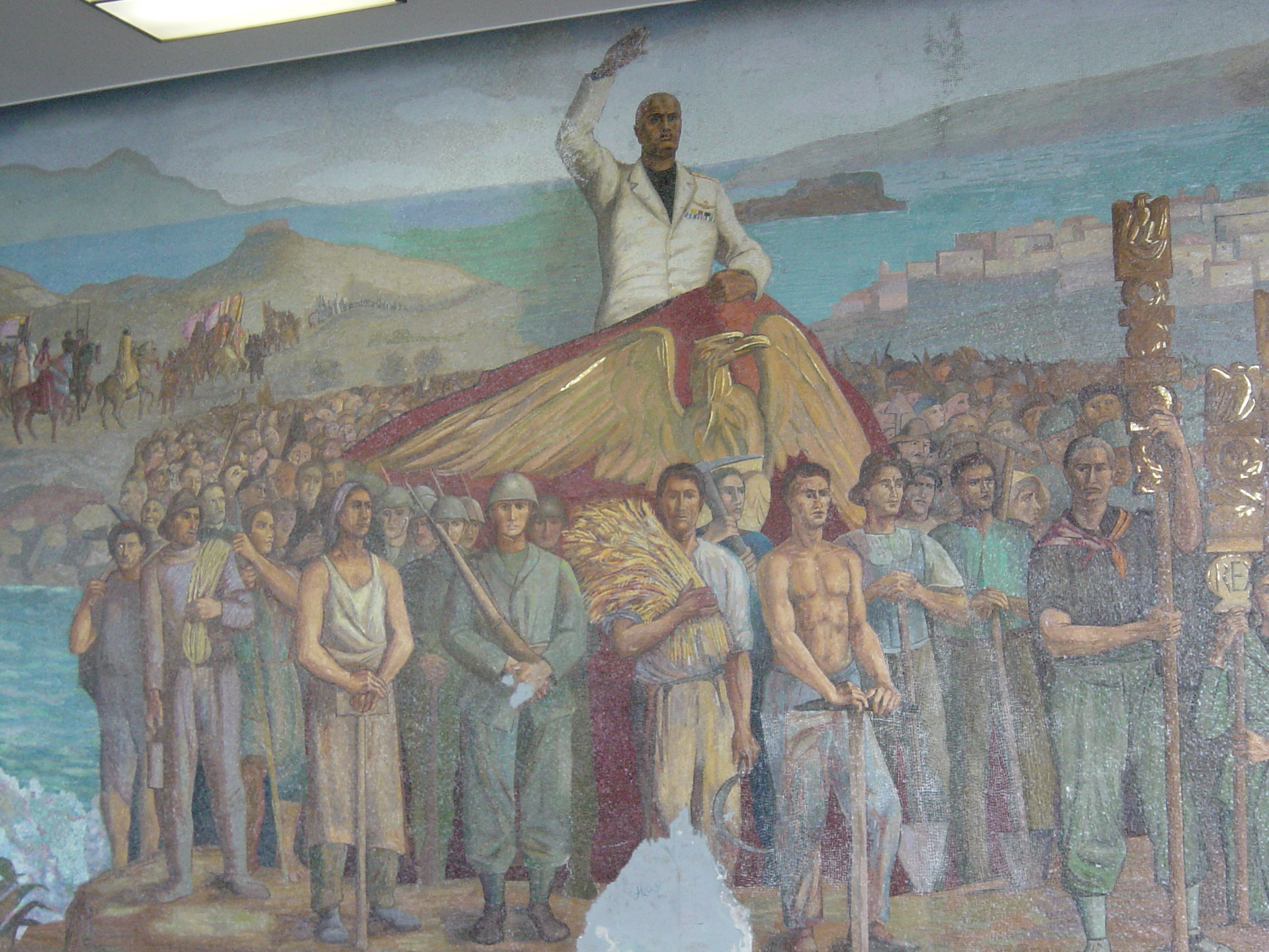 Detail des Wandmosaiks im Mosaiksaal Messina Marittima